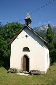 Vèneto: Antica chiesa di Sagron